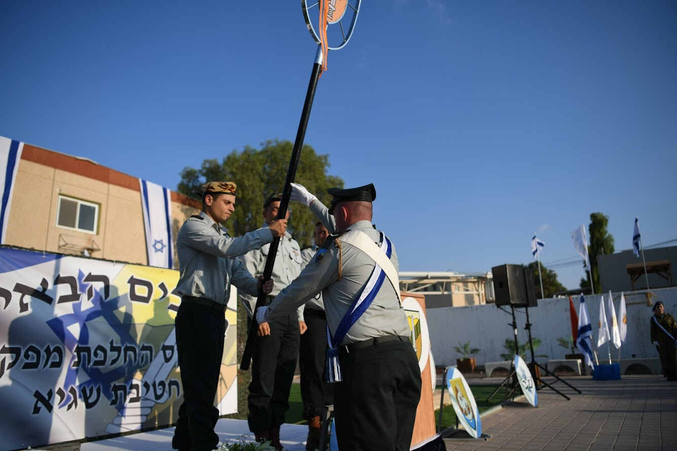 מינוי אל"ם יצחק בן בשט למפקד חטיבת שגיא. טקס ההחלפה נערך בבסיס קציעות, בראשות מפקד פיקוד הדרום אלוף הרצי הלוי, ומפקד האוגדה, תא"ל גיא חזות..